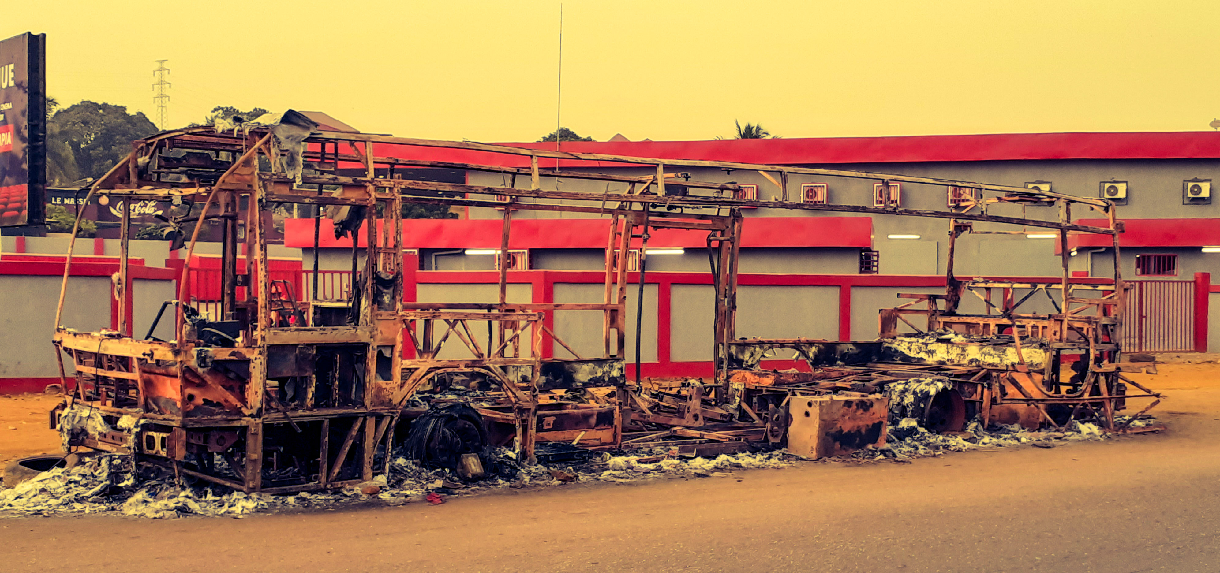 Bus calciné sur l'autoroute fidèle Castro This is an image with the theme "Africa on the Move or Transport" from: Guinea